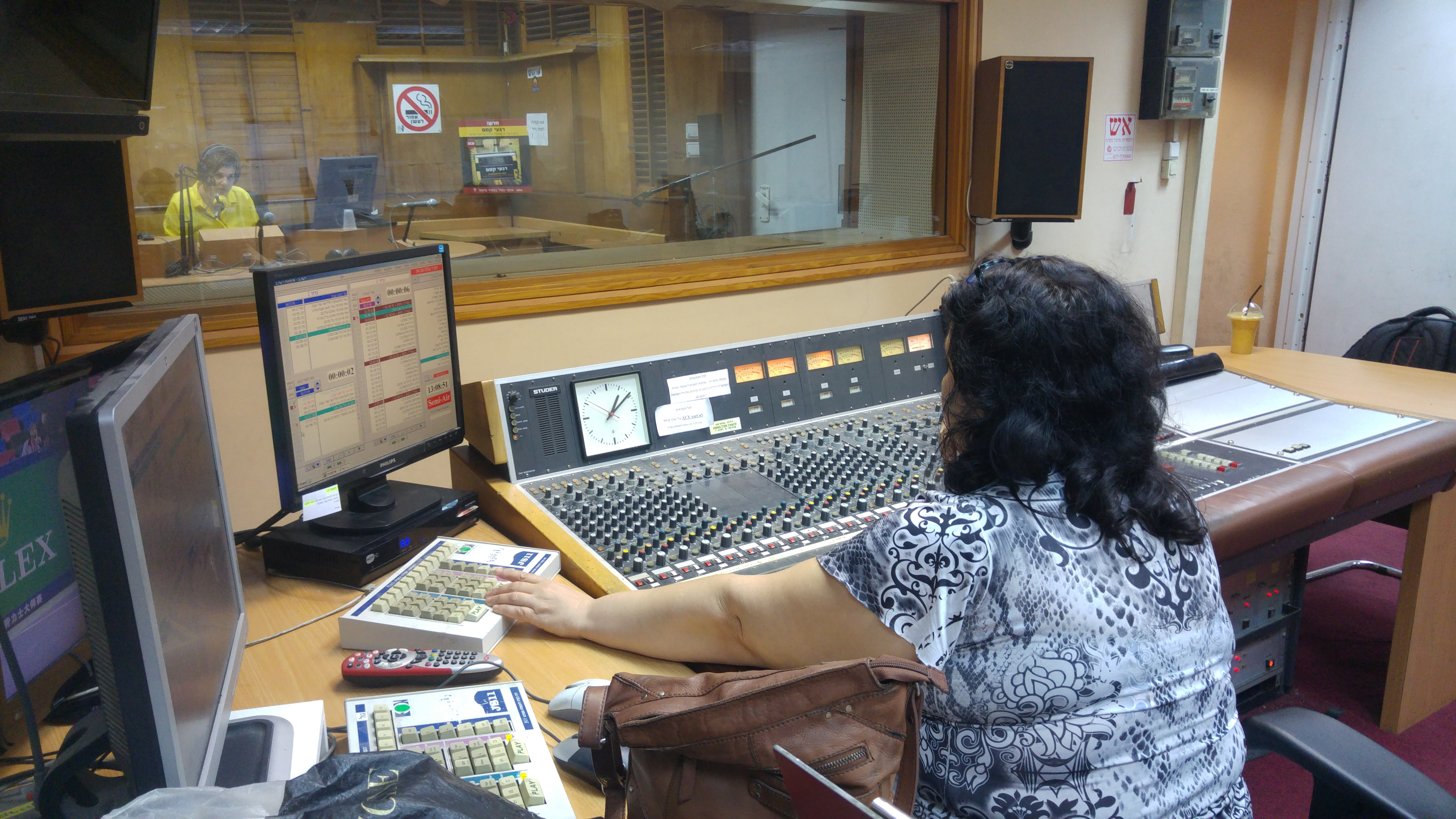 מתחם רשות השידור בתל אביב, ליד הקריה ומתחם שרונה.